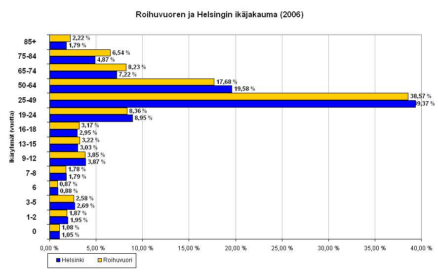 Roihuvuoren ja Helsingin kaupungin ikäjakauman kuvaaja 1.1.2006